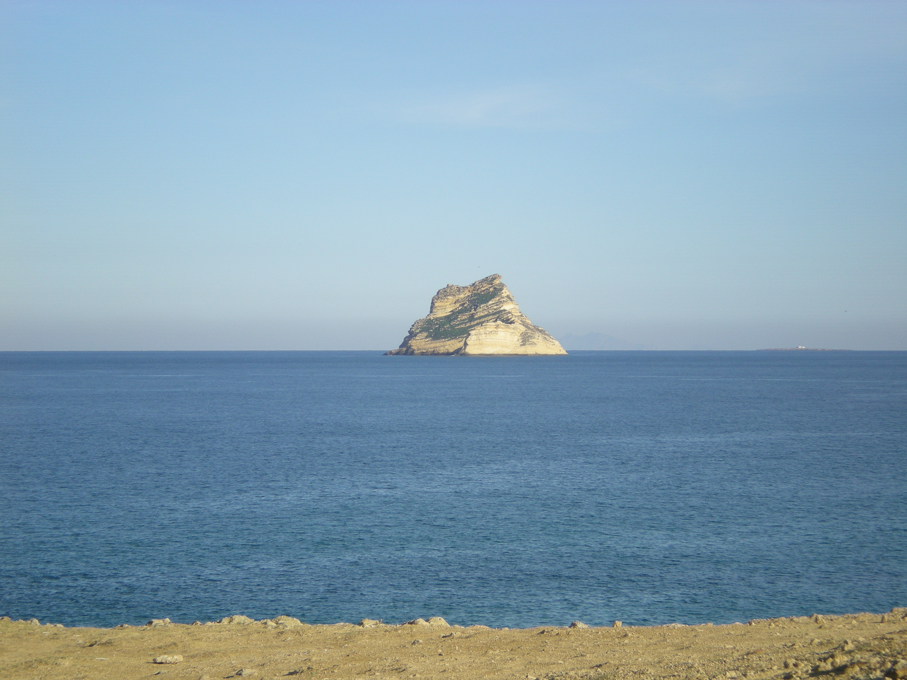 Vue de l'île Pilau de la plage de Sounine, Tunisie